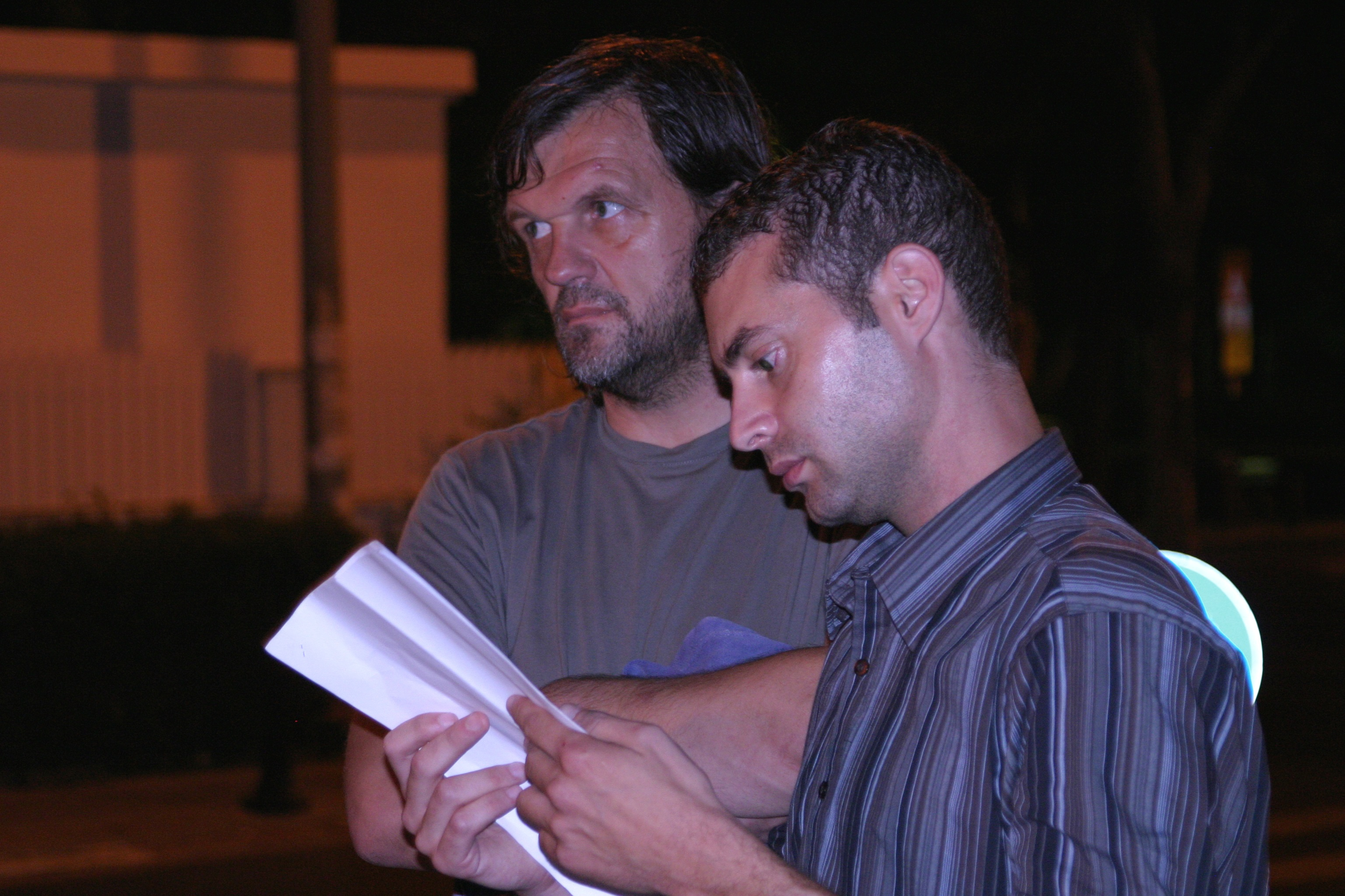 איל סיבי מביים את קוסטוריצה בסצנה עלילתית, מתוך הסרט "חלום קוסטוריצה", בבימויו של איל סיבי, 2013